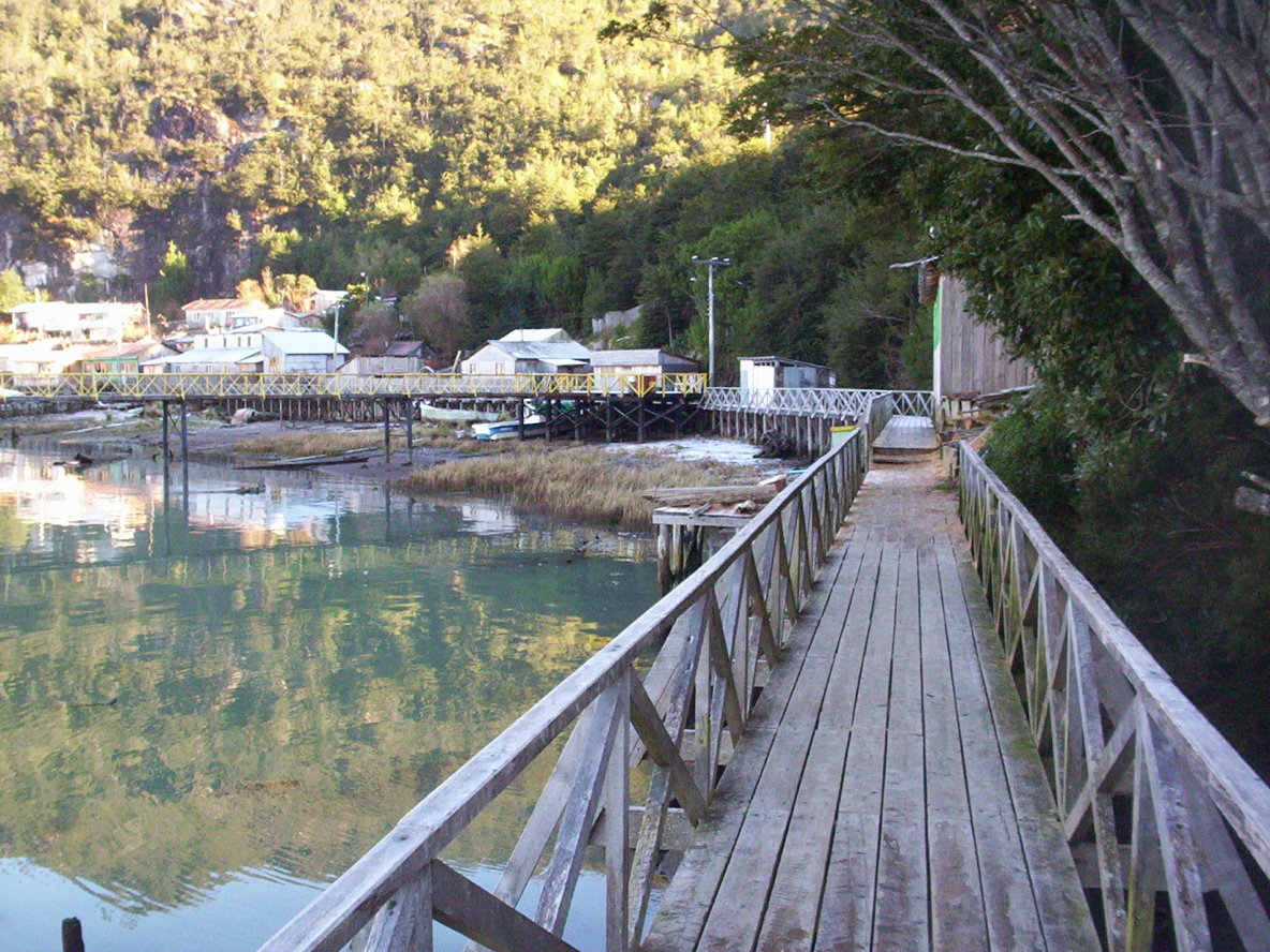 Pasarelas de ciprés en Caleta Tortel, Invierno 2006.